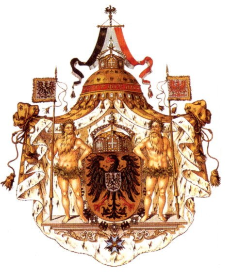 Herb Cesarstwa Niemieckiego (wg. H.G.Ströhl, Deutsche Wappenrolle, 1897)